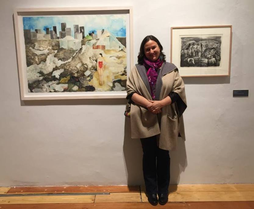 Acuarela sobre papel exhibida en el Museo de la Ciudad de México, en la exposición La ciudad de México en el arte. Travesía de ocho siglos.